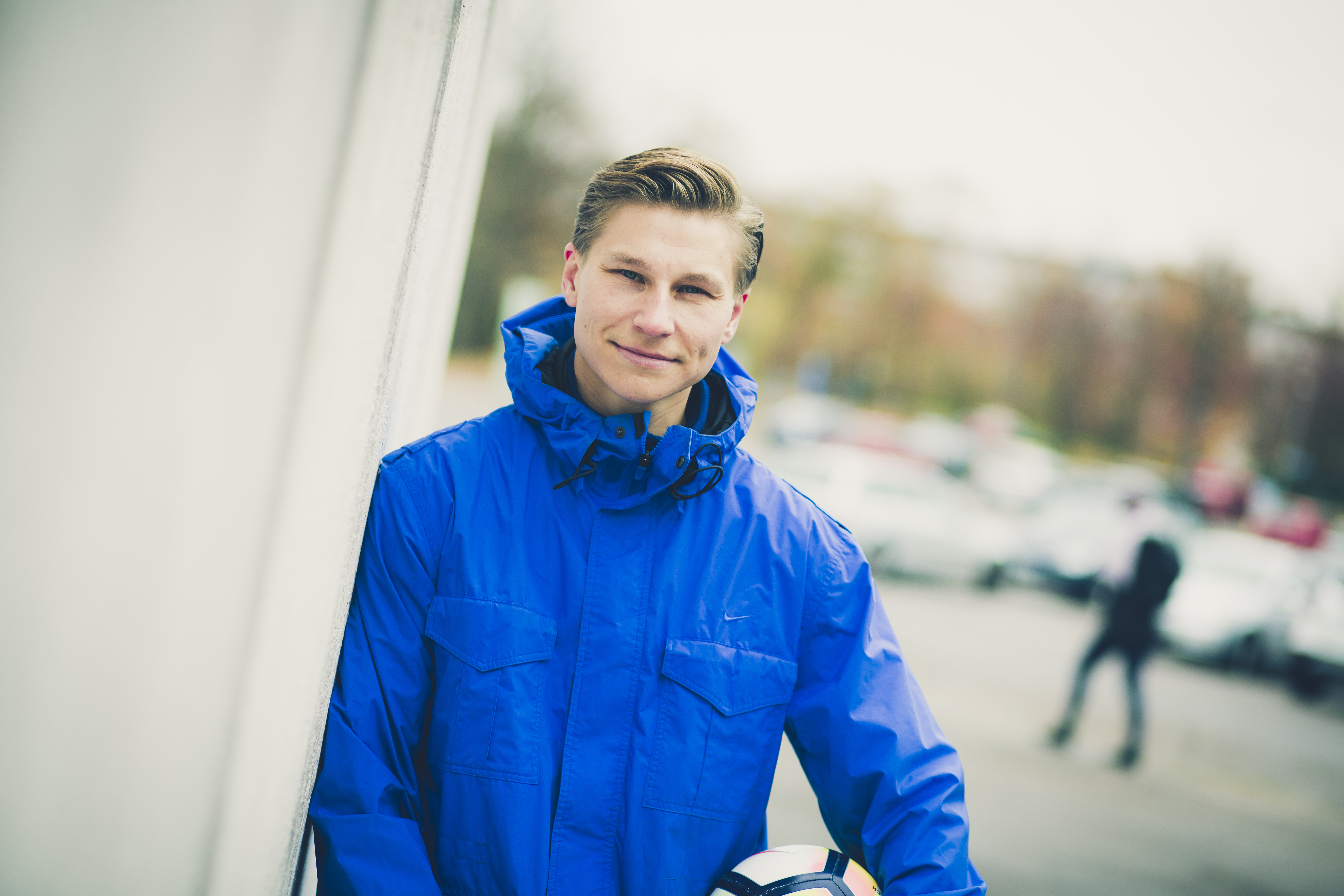 Antti Häkkänen